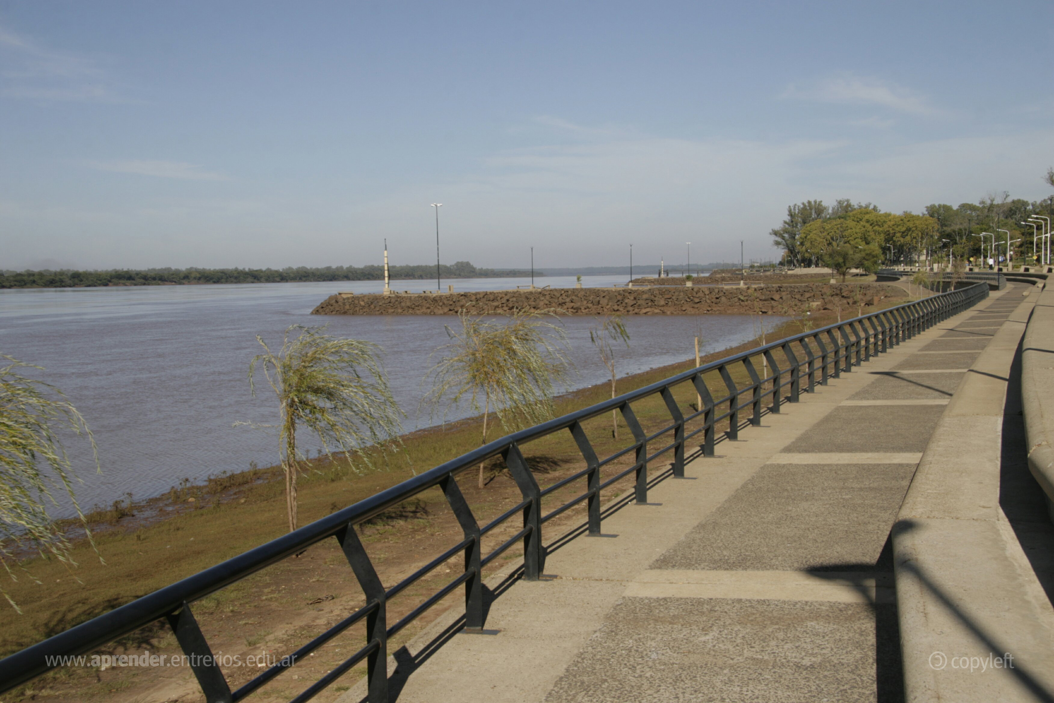 Ciudad de Concordia, provincia de Entre Ríos.